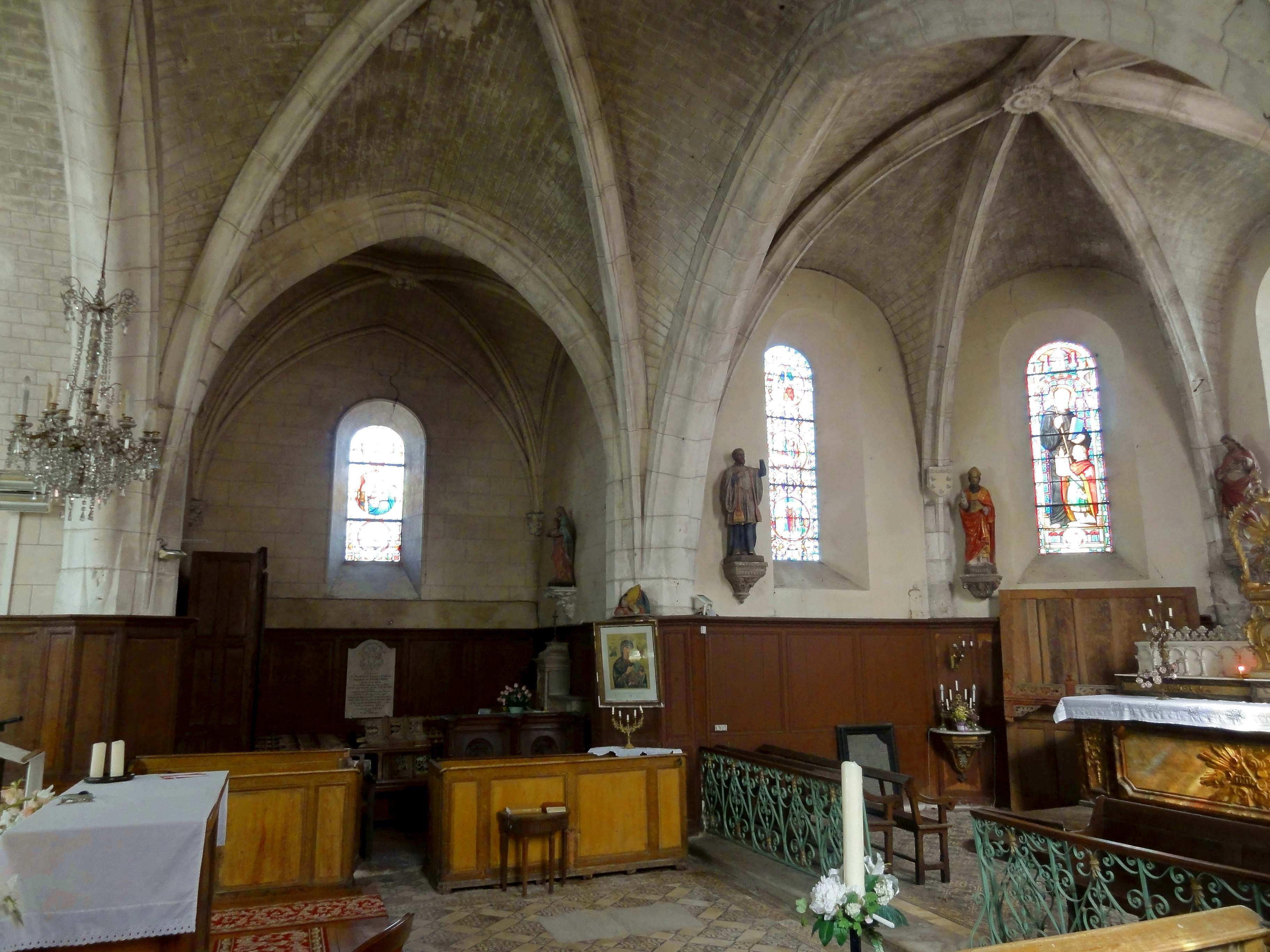 Intérieur de l'église - voir titre.